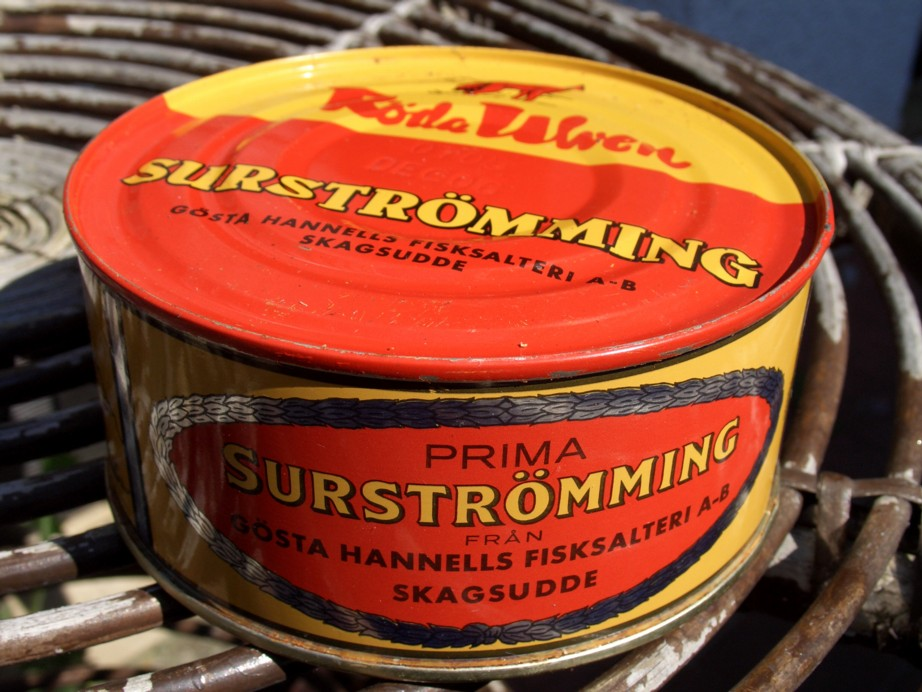 Eine Dose mit Surströmming